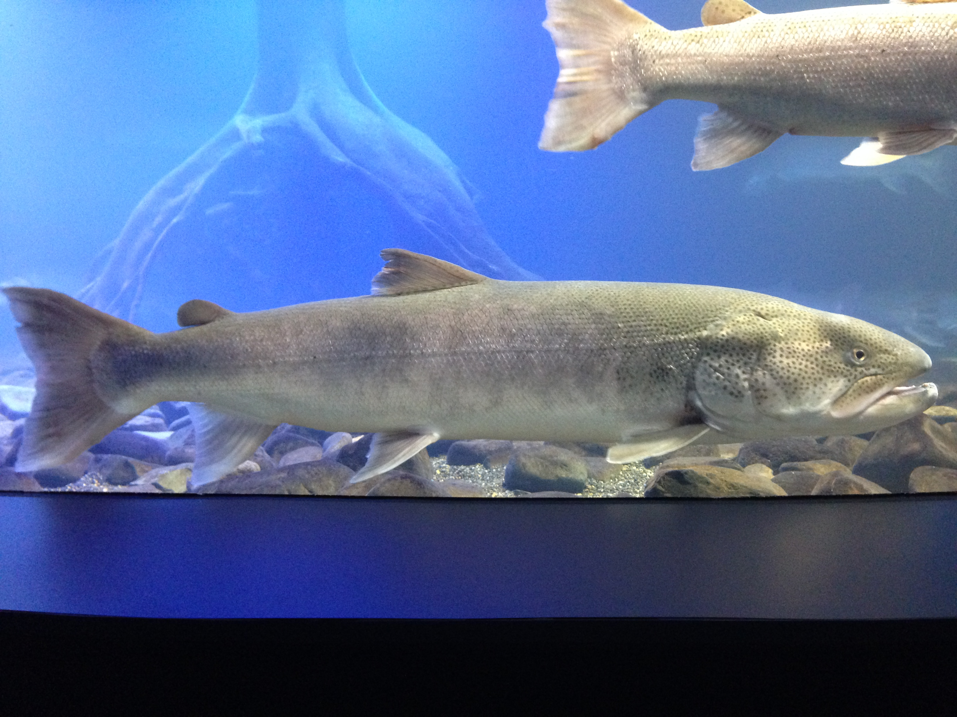 イトウ。山の水族館飼育個体。